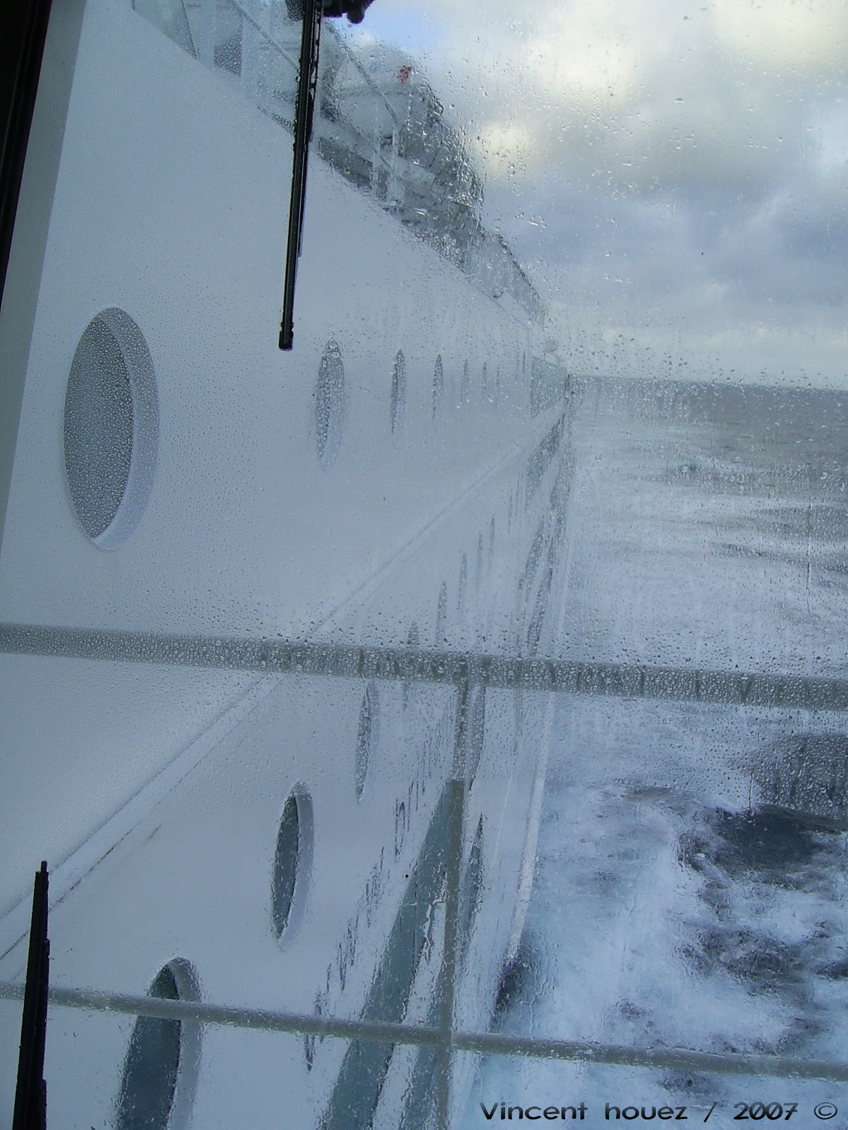 vue de la passerelle du Pont-Aven